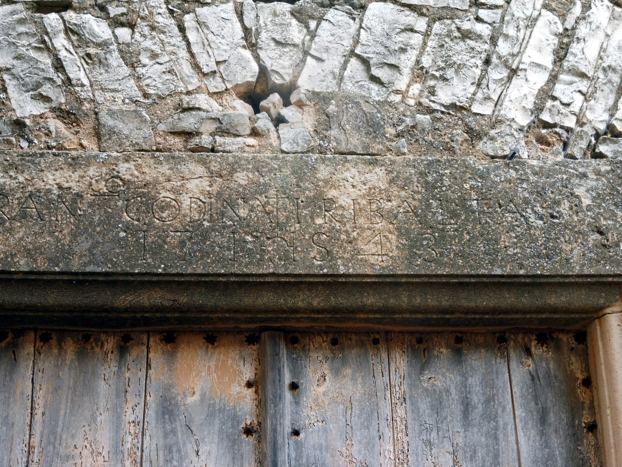 Capella de Sant Antoni de cal Codina (els Prats de Rei), detall de la llinda de la portada